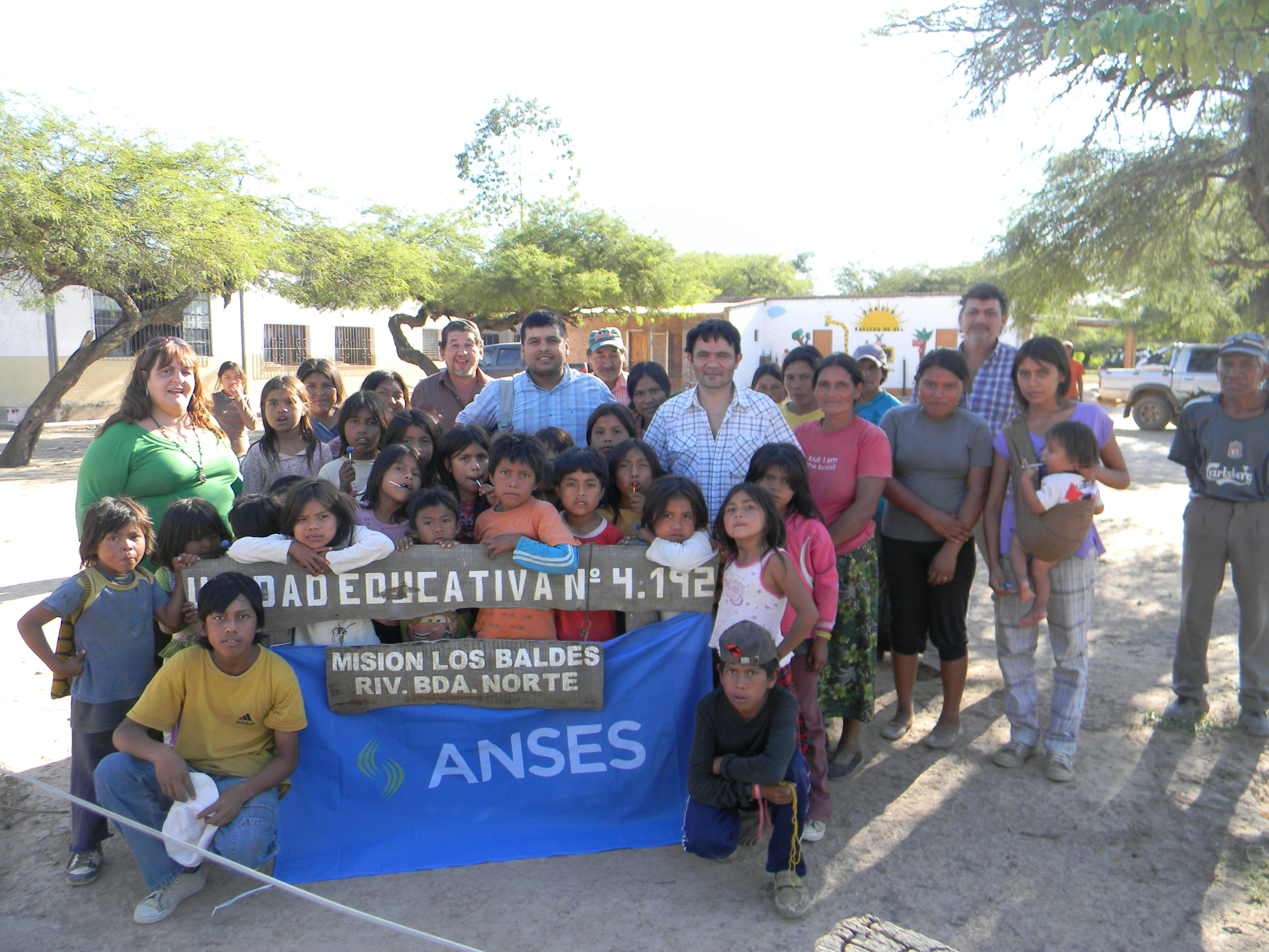 Las acciones que lleva adelante ANSES orientadas a los pueblos originarios aseguran la presencia de la seguridad social, con criterios de pluralidad, inclusión y participación de las comunidades donde el organismo acciona. Actualmente, el organismo previsional desarrolla diferentes programas que abordan la cuestión indígena de una manera integral: capacitación presencial, campaña informativa en lenguas originarias y entrega de netbooks en escuelas de Educación Intercultural Bilingüe. Desde 2009, implementa el programa Bienestar para nuestra gente de capacitación en Seguridad Social para los pueblos indígenas. El programa tiene como propósito garantizar el acceso de los pueblos indígenas a las prestaciones de la Seguridad Social, desde el respeto y valorización de su identidad cultural. La iniciativa contempla el mejoramiento de los canales institucionales para la tramitación de las prestaciones de ANSES y formación y capacitación sobre los derechos. Para complementar las jornadas de formación y ampliar el impacto, durante 2011 trabajó en una campaña informativa en diversas lenguas indígenas para realizar afiches y micros radiales sobre la Asignación Universal y por Embarazo, la posibilidad de obtener una jubilación y los derechos sociales que otorga ANSES. La campaña informativa en lenguas indígenas se realizó de manera participativa, por eso ANSES realizó jornadas junto a qom y wichis de Ing. Juarez en Formosa y con mbya guaraní de Aristóbulo del Valle, Misiones. Todas las comunidades recibieron con entusiasmo la propuesta y emprendieron el trabajo de realizar las traducciones en conjunto. En cada una de los encuentros se debatía acerca del significado para la comunidad de las prestaciones que brinda ANSES y los maestros bilingües fueron los encargados de las traducciones tanto para el guión del spot radial como para el texto de la pieza gráfica.